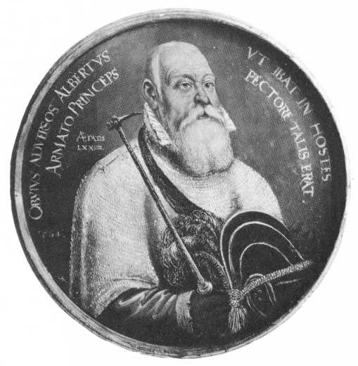 Albrecht I.